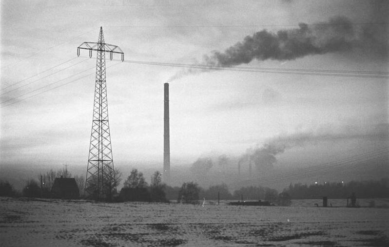 Smog-Verordnung in der DDR ADN-ZB/Weisflog/18.12.89/Karl-Marx-Stadt: Smog-Verordnung/ Staub und Qualm wie hier in der Nähe von Karl-Marx-Stadt machen auch für den Laien erkennbar: es ist "dicke Luft". Schwieriger wird das optische Erkennen der Smog-Gefahr bei blauem Himmel und Sonenschein -typisch für winterliche Hochdruck Immissionswetterlagen. Seit dem 2.11.89 gilt in der DDR eine spezielle"Smogordnung", die einerseits Maßnahmen zur Reduzierung des Schadstoffausstoßes verfügt und gleichzeitig Informationen und medizinische Betreuung der Bevölkerung sichert. Die jetzt in der DDR gültigen Schwefeldioxid-Schwellenwerte für die verschiedenen Smogstufen stimmen mit denen der Muster-Smog-Verordnung des Länderausschusses für Immissionsschutz der BRD überein. Es gibt in der BRD aber zusätzliche Festlegungen zur Begrenzung von Stickoxiden, Kohlenmonoxid und Schwefelstaub, deren Gewicht sich jedoch in den einzelnen Bundesländern deutlich unterscheiden.